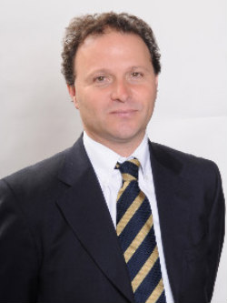 Diputado de la República de Chile, militante del Partido Socialista de Chile.